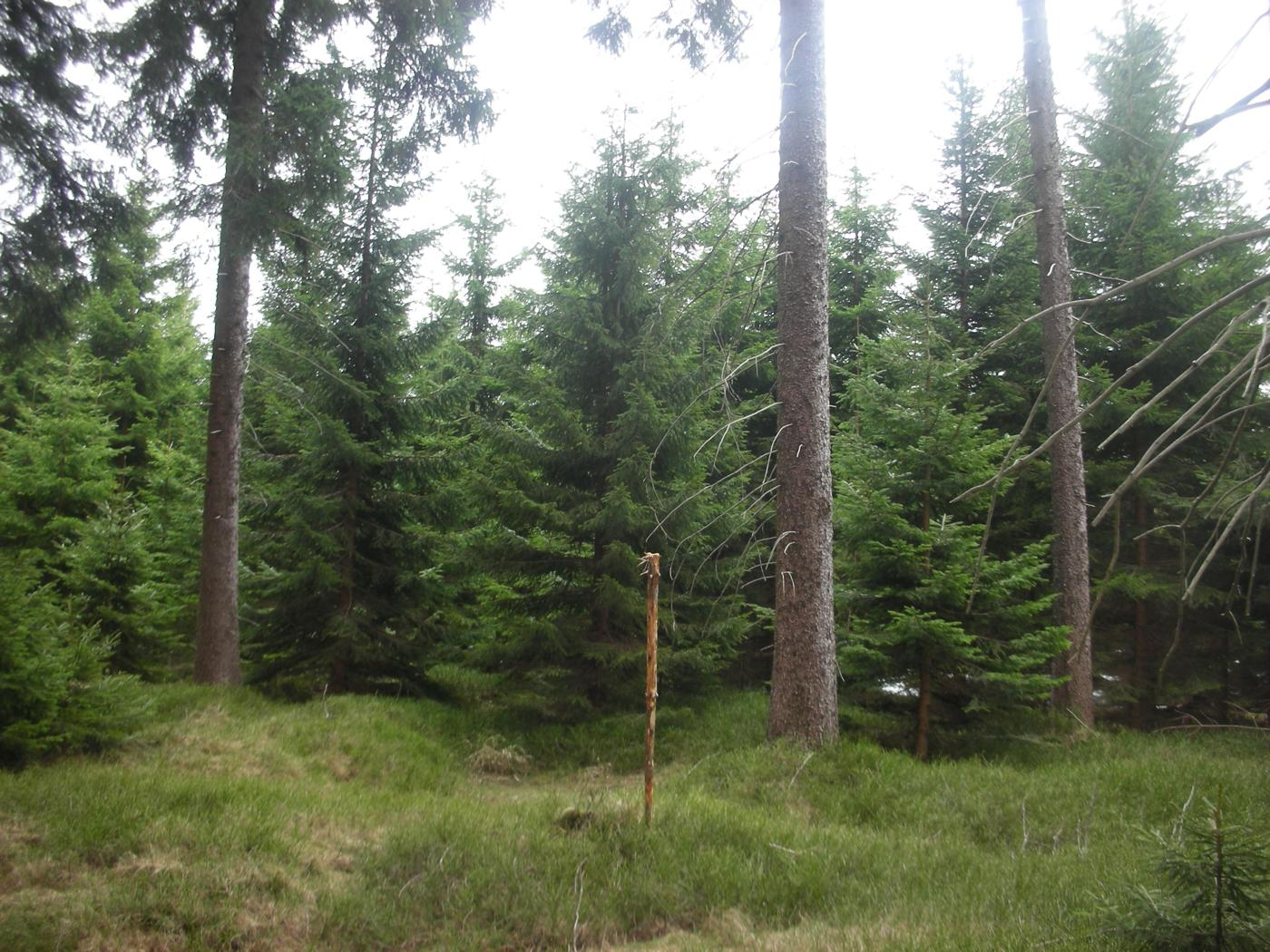 Gipfel (ca. 826 mtr) des Ursrpungsberges, höchste Stelle des Elstergebirges